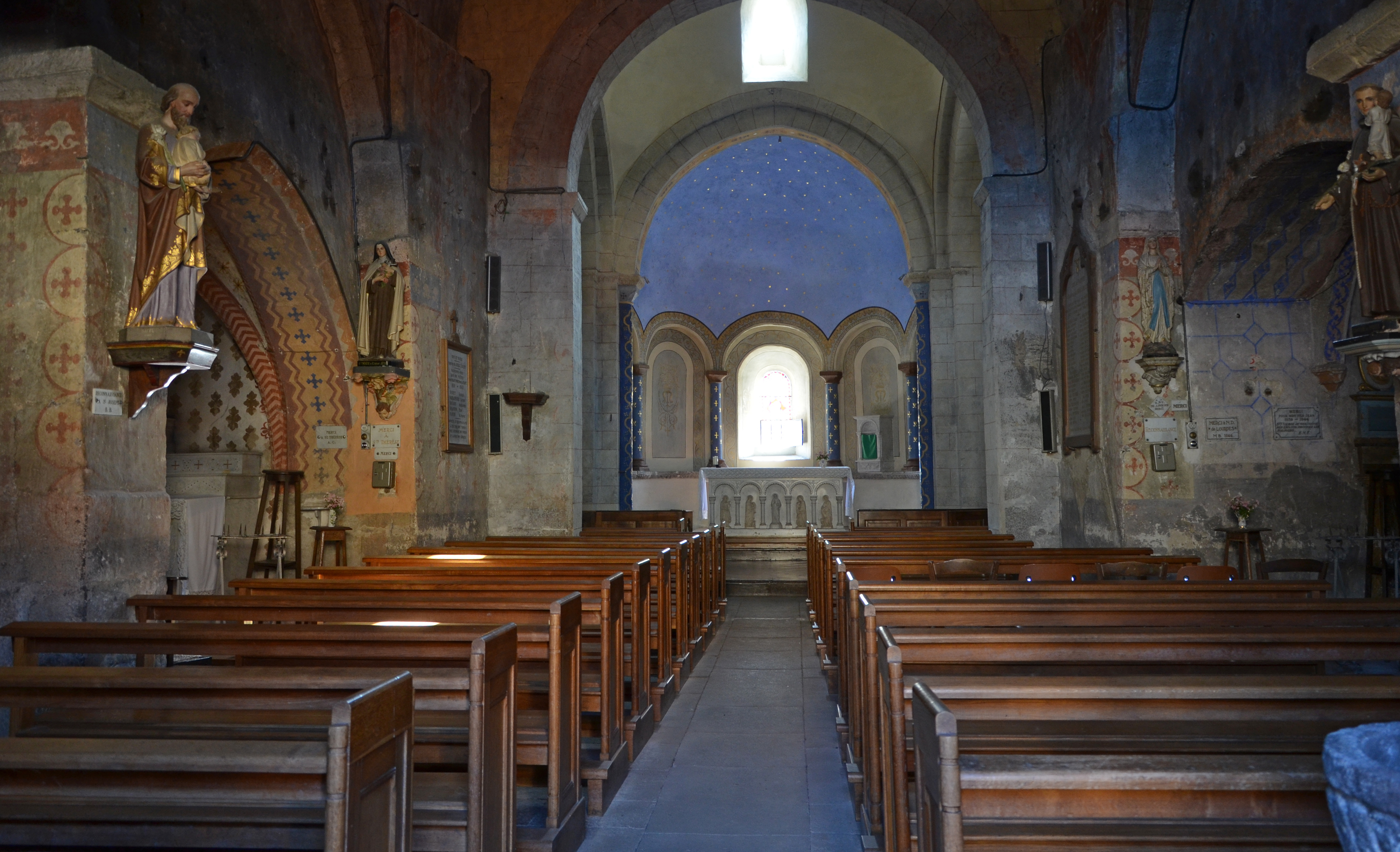 Nef et choeur église St Nicolas à Auriac l'Eglise, Cantal, France .